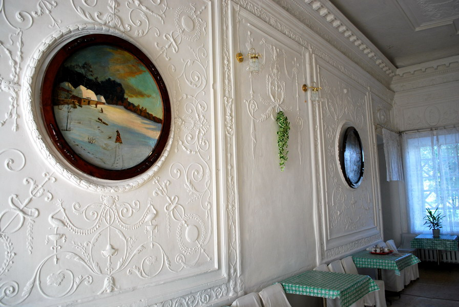 Палац Румянцева-Задунайського (інтер'єр): Сучасний інтер'єр палацу Румянцева-Задунайського у с. Вишеньки Коропського району